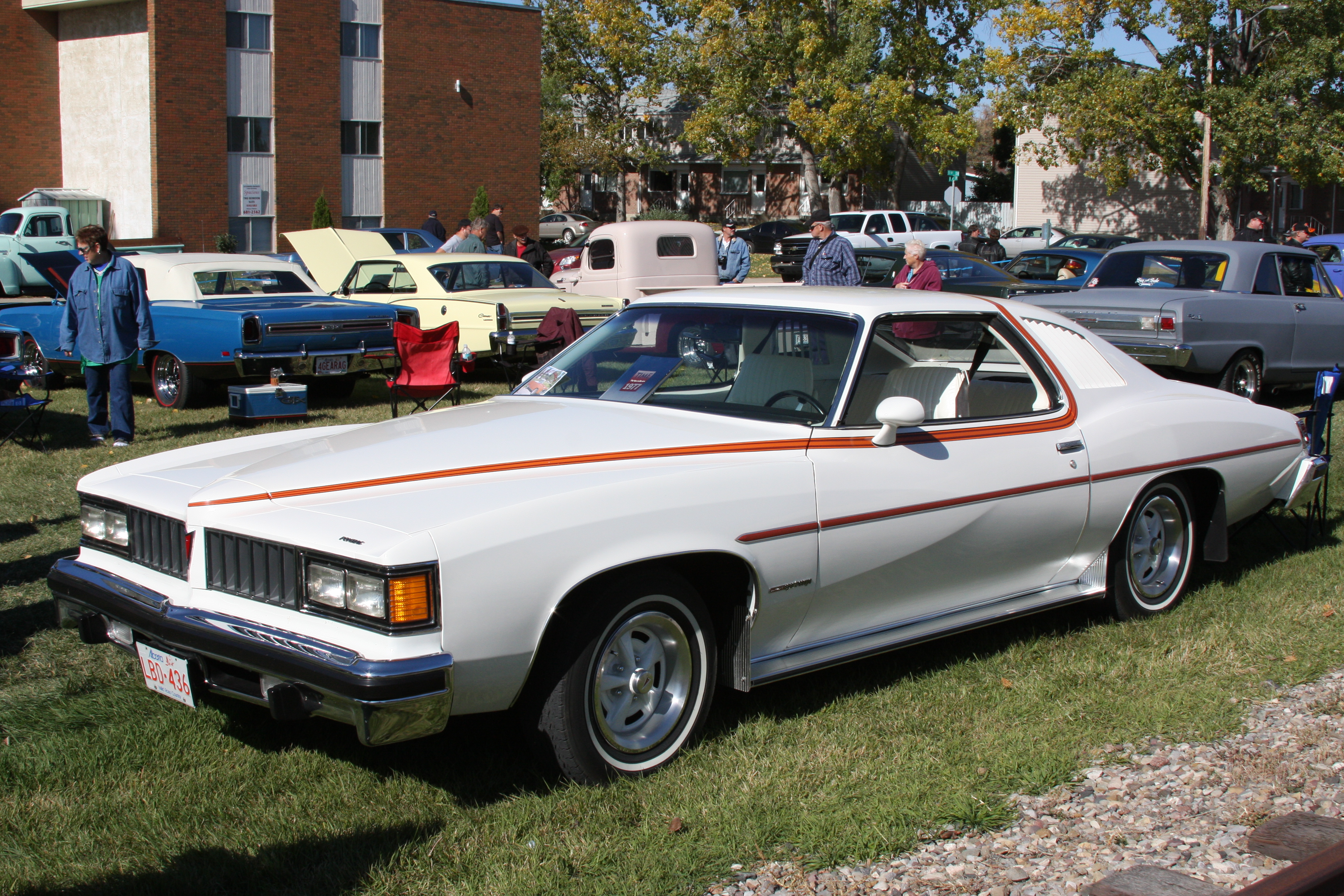 1977 Pontiac LeMans